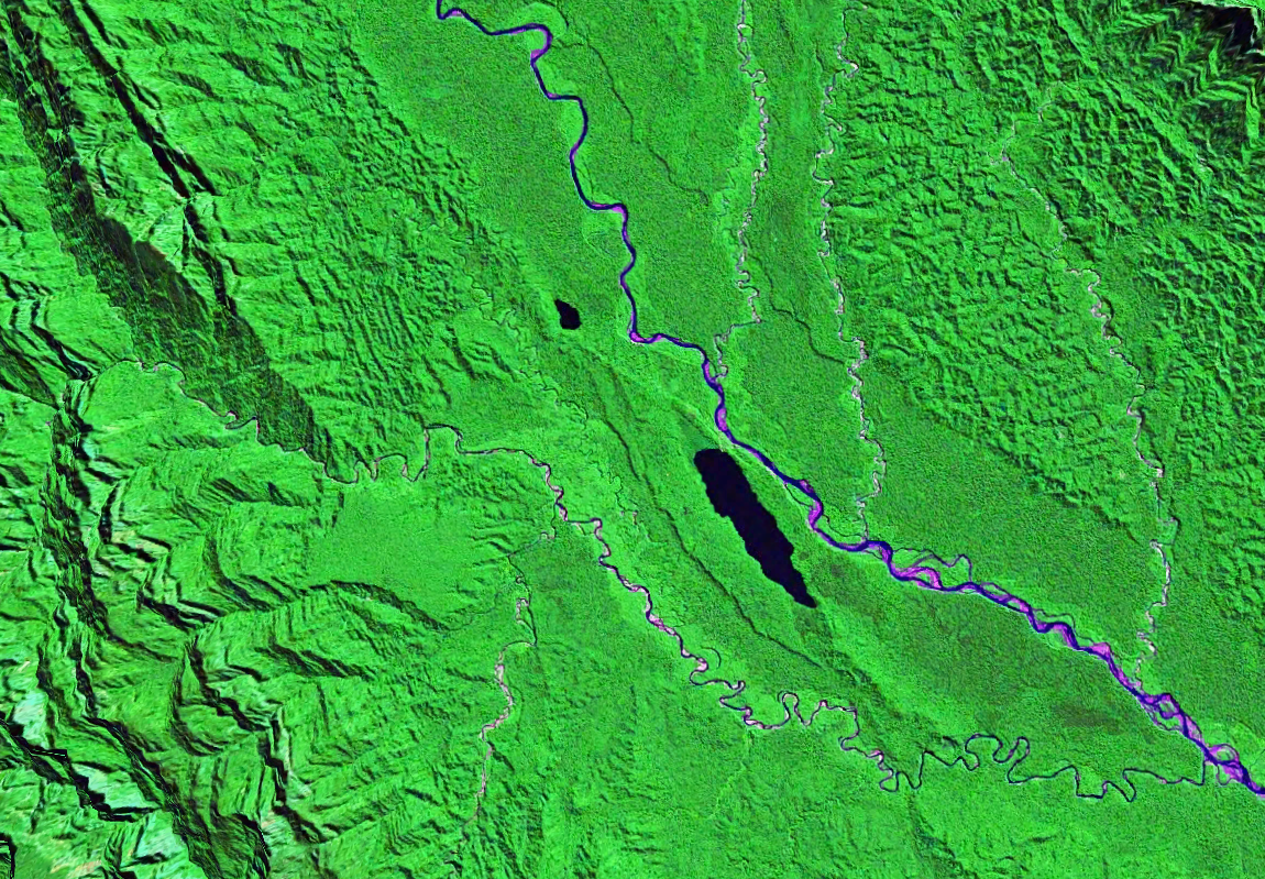 Imagen satelital del lago Chalalan ubicado al norte y el de Santa Rosa más grande ubicado al sur, situados dentro del Parque Nacional Madidi, Bolivia.